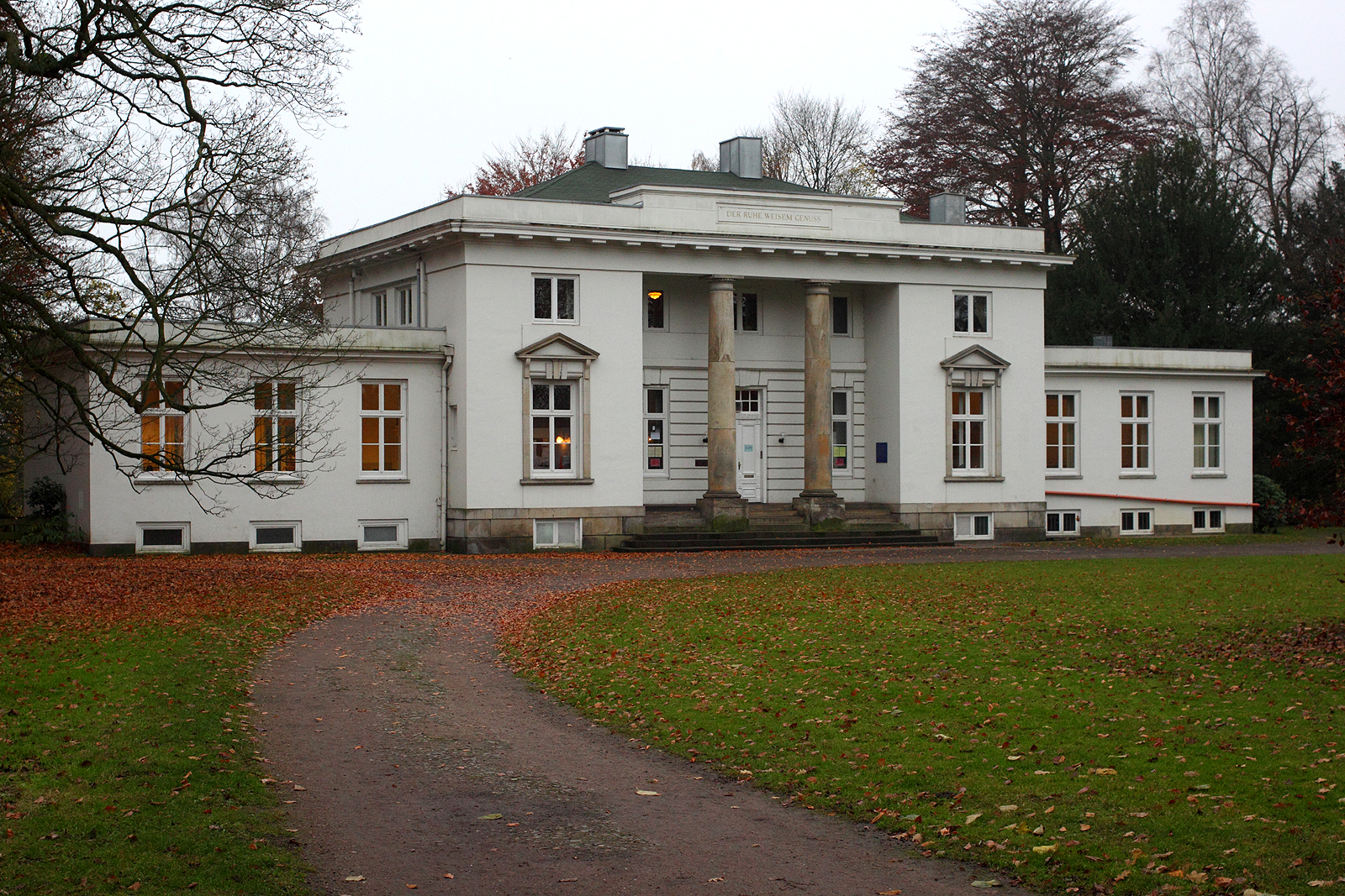 Herrenhaus Hirschpark, erbaut zwischen 1789 und 1792 von C. F. Hansen, zweigeschossiger Putzbau von fünf Achsen mit eingeschossigen dreiachsigen Seitenflügeln, Eingangsfront mit Vorhalle und Freitreppe, Elbfront siebenachsig mit dreiachsigem halbrunden Mittelausbau; nebst Pförtnerhaus, Fachwerkbau mit angebauter Rundbogendurchfahrt, ca. 1950 abgebrochen. Hinweis: Seit dem 4. August 2003 ist das Herrenhaus Hirschpark außerdem als Teil des Ensembles „Hirschpark und seine Bauten“ unter der Denkmallisten-Nummer 1385 verzeichnetThis is a photograph of an architectural monument. ,16931